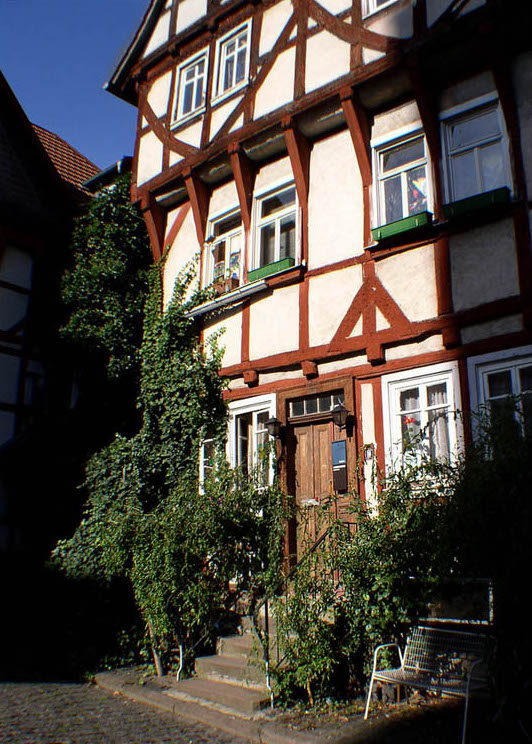 Fachwerkhausromantik in Alsfeld